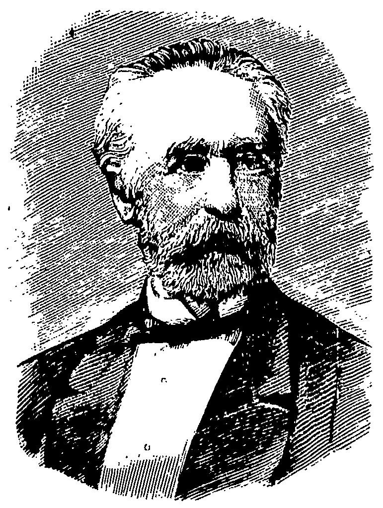 Statsråd Adolph Frederik Munthe.